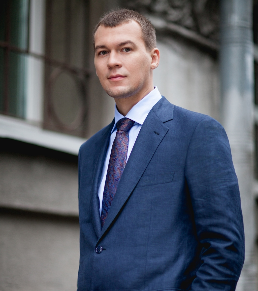 Михаил Дегтярёв, 2013